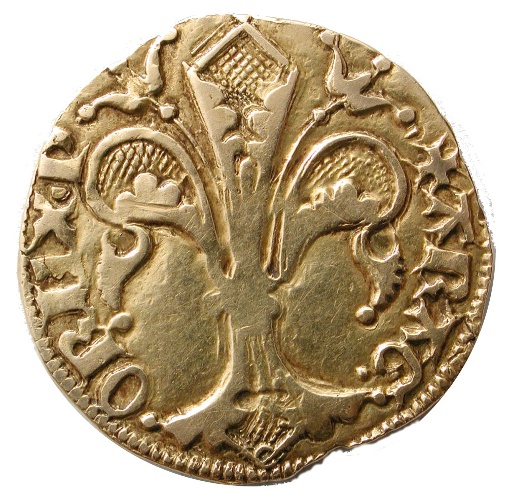 Florín aragonés de oro de Pedro IV de Aragón, acuñado en Zaragoza entre 1369 y 1372. Reverso